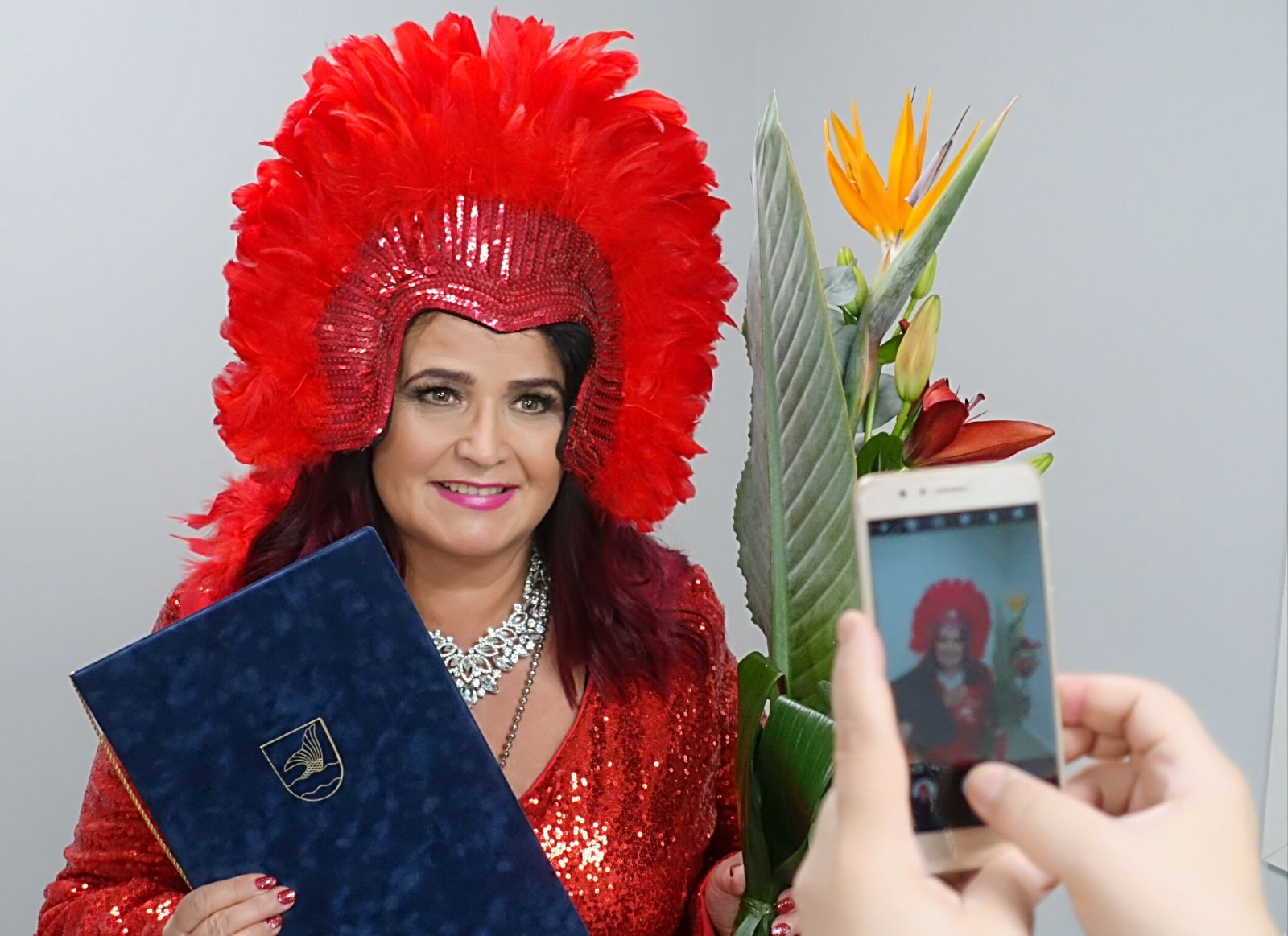 Meiju kulttuuri palkinto 2017